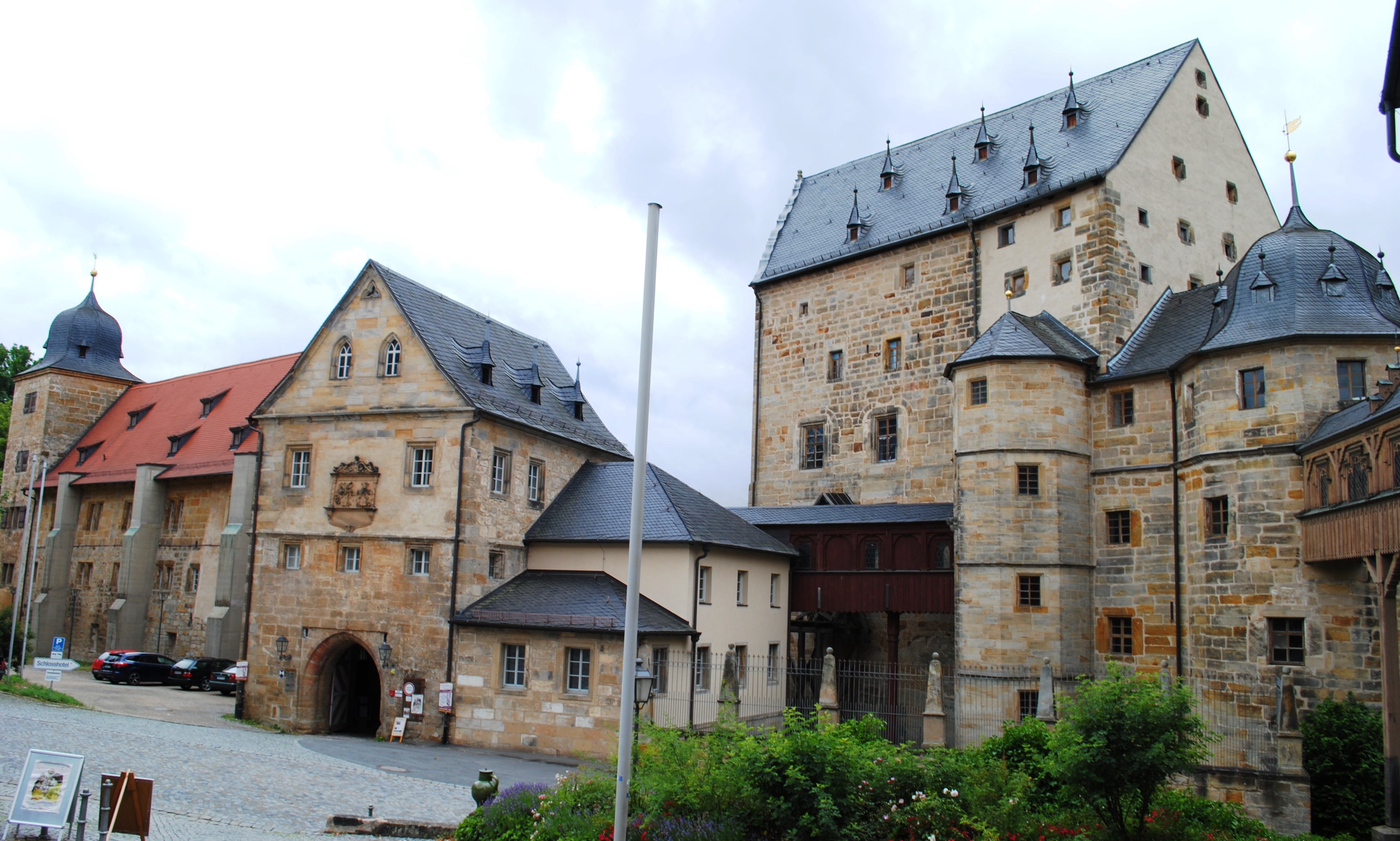 Panorama, Ostseite, Schloss Thurnau